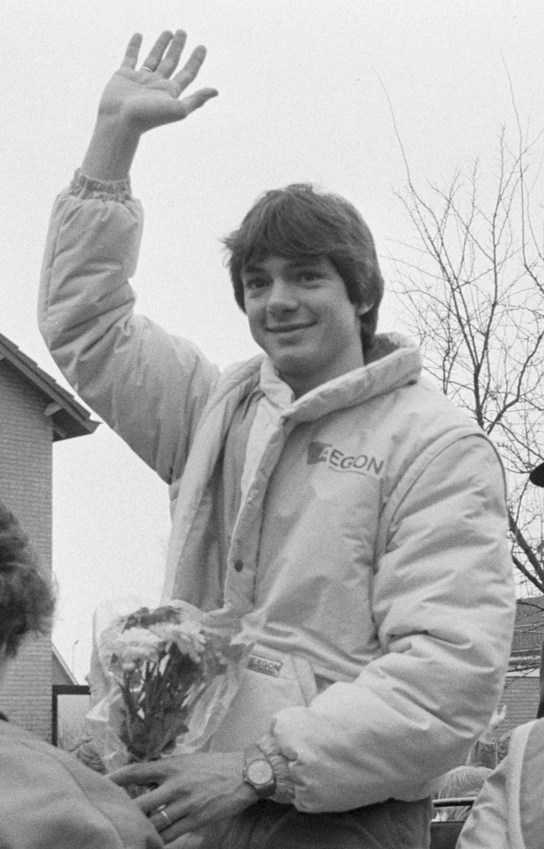 Hein Vergeer